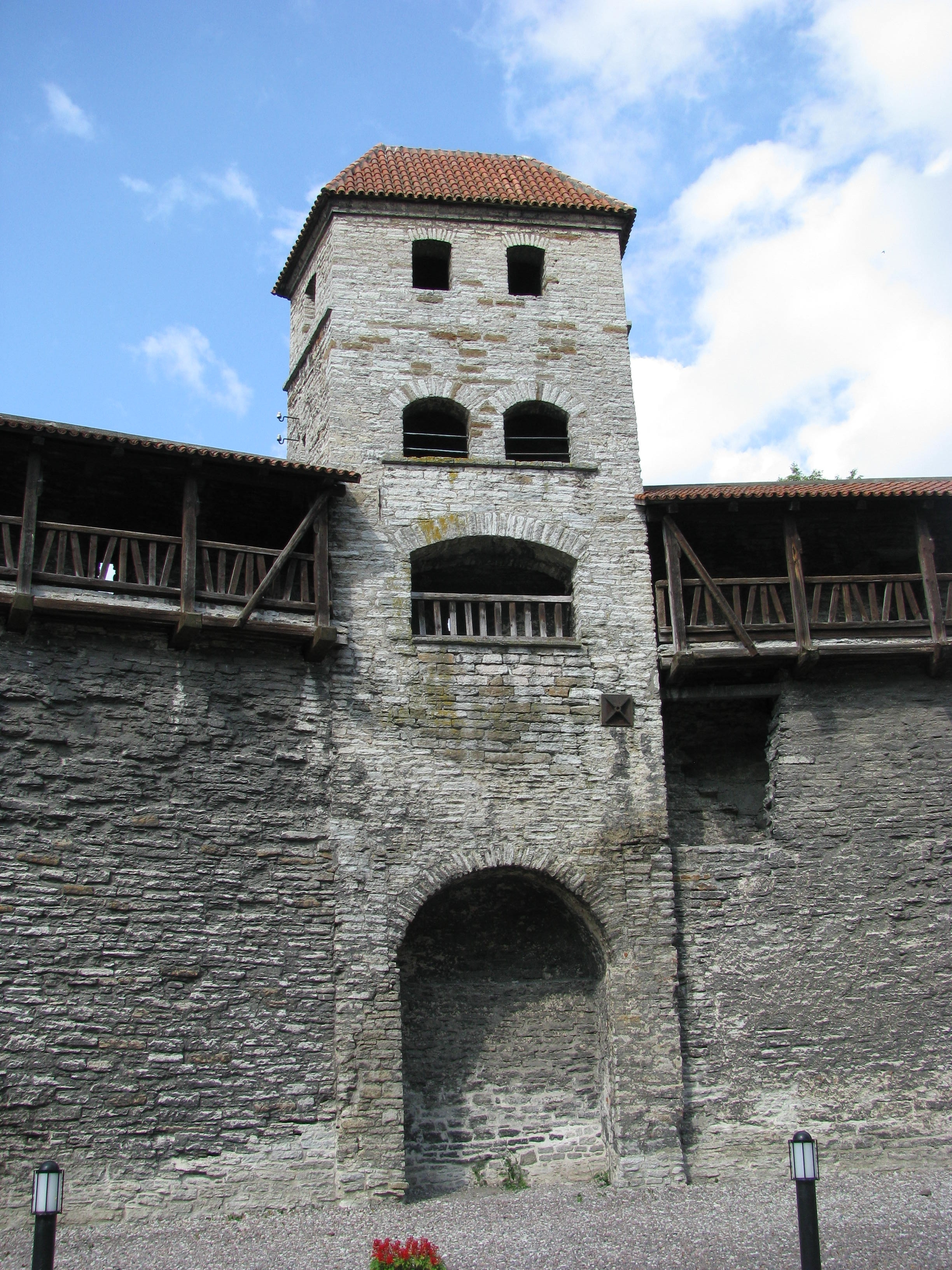 Saunatorn Tallinna linnamüüris.